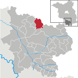 Hohenbucko in Brandenburg (Country) - District Elbe-Elster